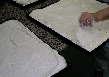 pan di spagna